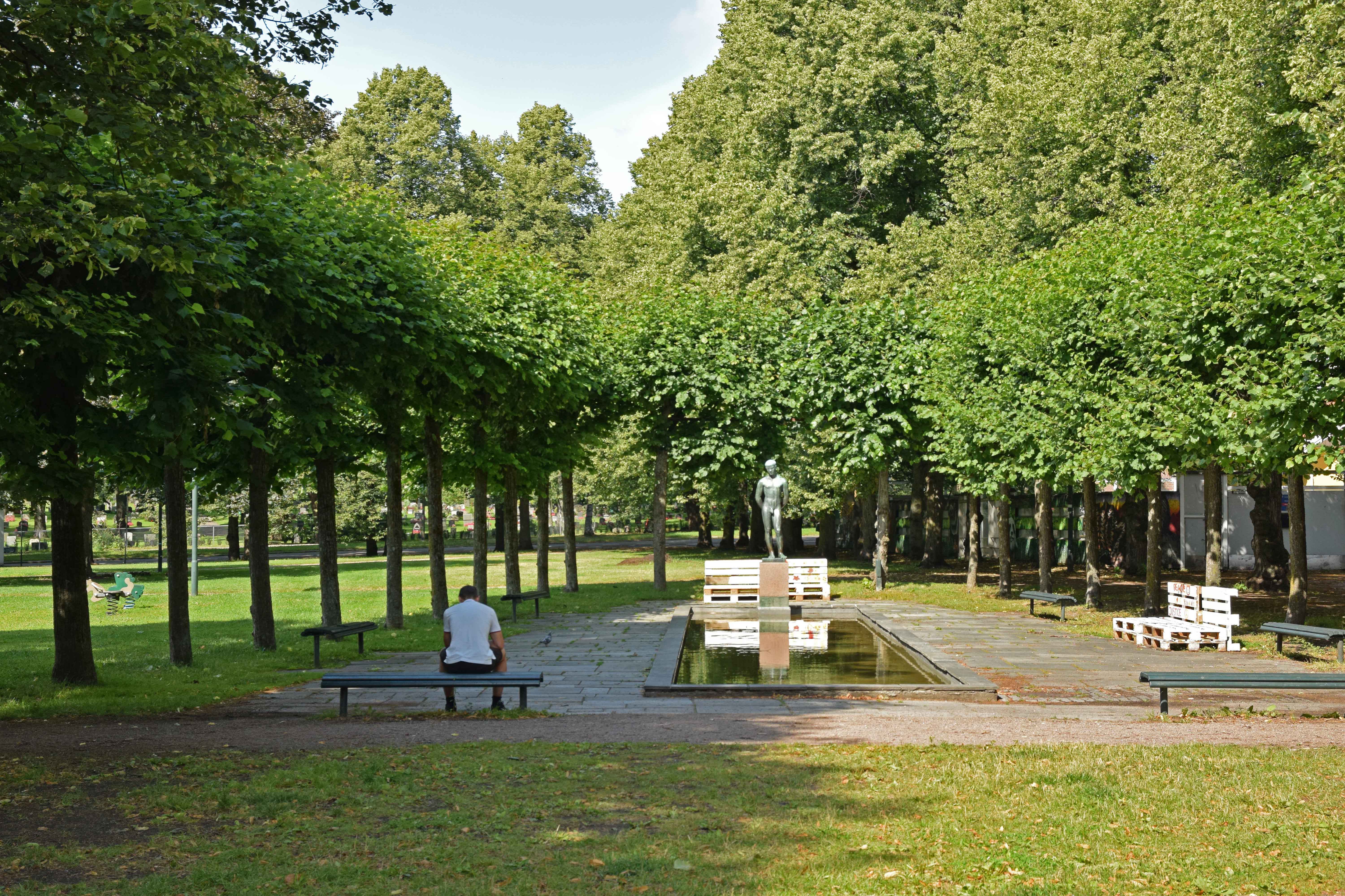 Gråbeinsletta på Sagene, Oslo, med skulpturen «Ung mann (Josef)» av Jørgen Gudmundsen-Holmgreen, satt opp i 1947. Sett mot Uelands gate.